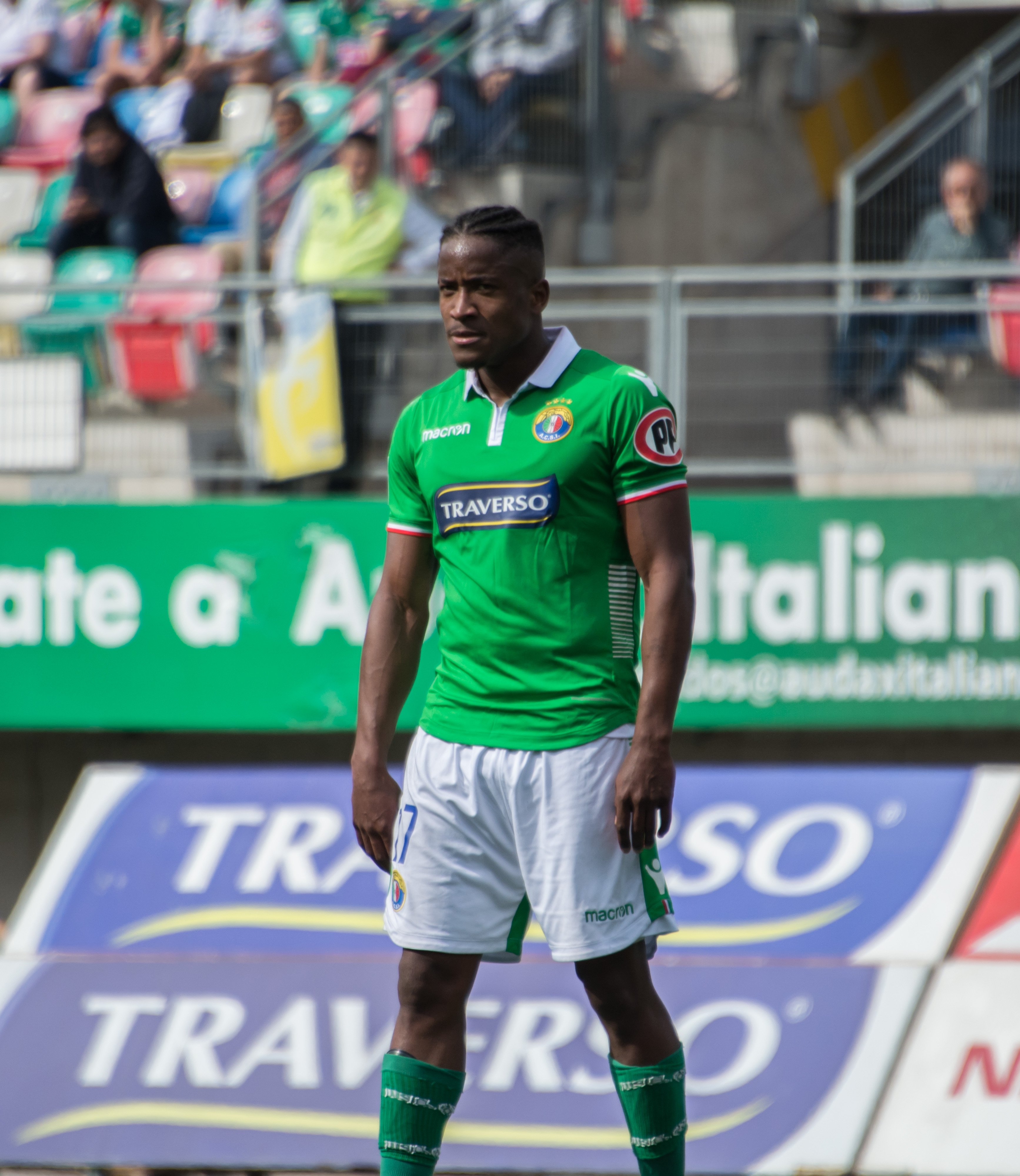 Sergio Santos, Audax Italiano v Deportes Iquique, Estadio Bicentenario de La Florida, La Florida, Santiago, Chile